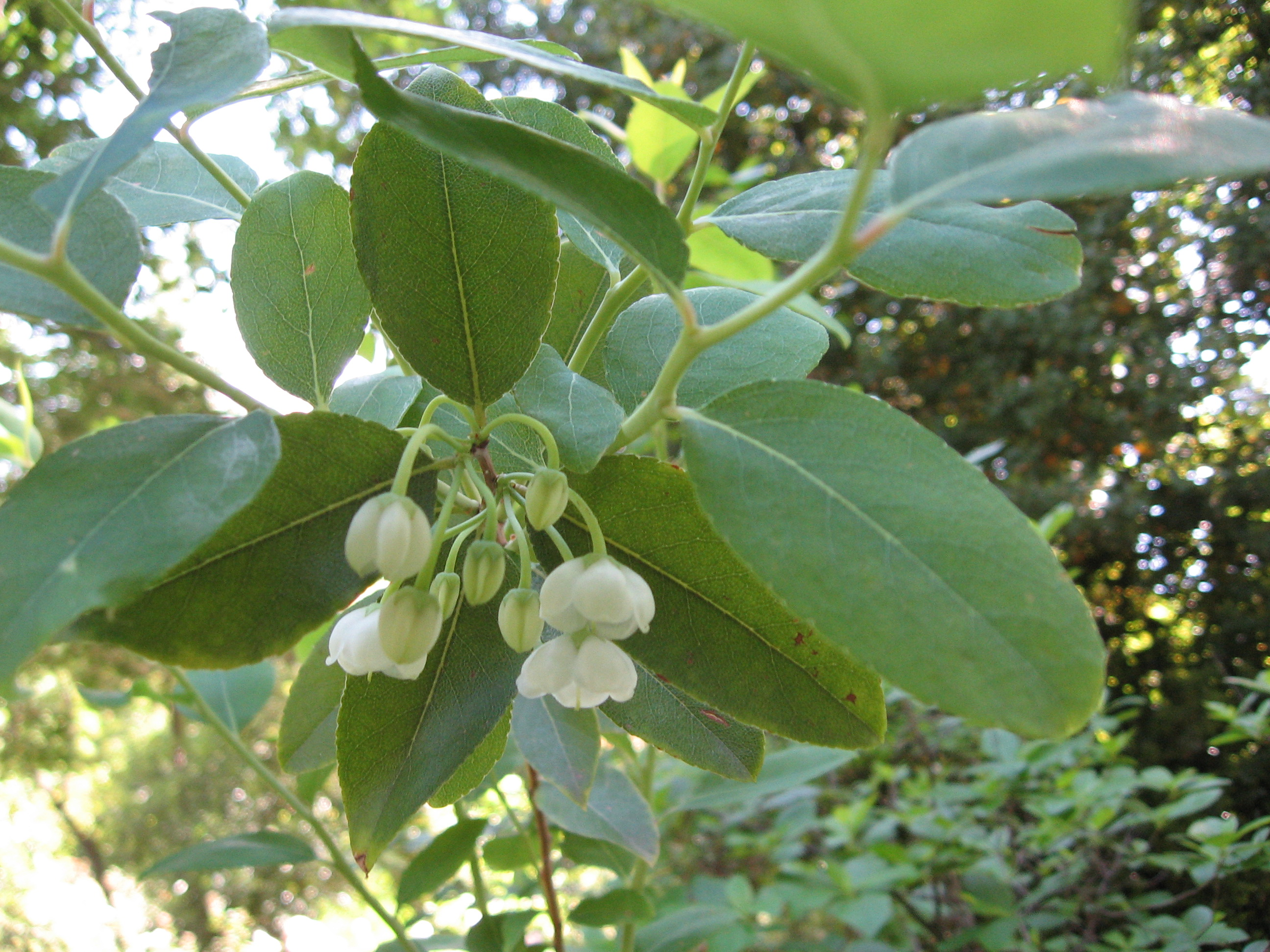 Zenobia pulverulenta. Real Jardín Botánico de Madrid.